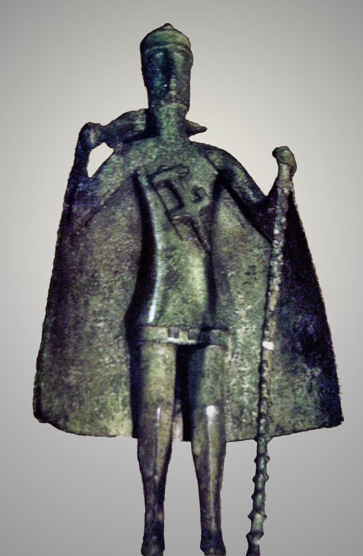 Bronzetto sardo. Cagliari, Museo Archeologico Nazionale.